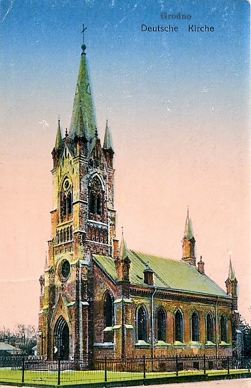 Grodzieński zbór luterański ś. Jana, po gruntownym przebudowaniu w r. 1912